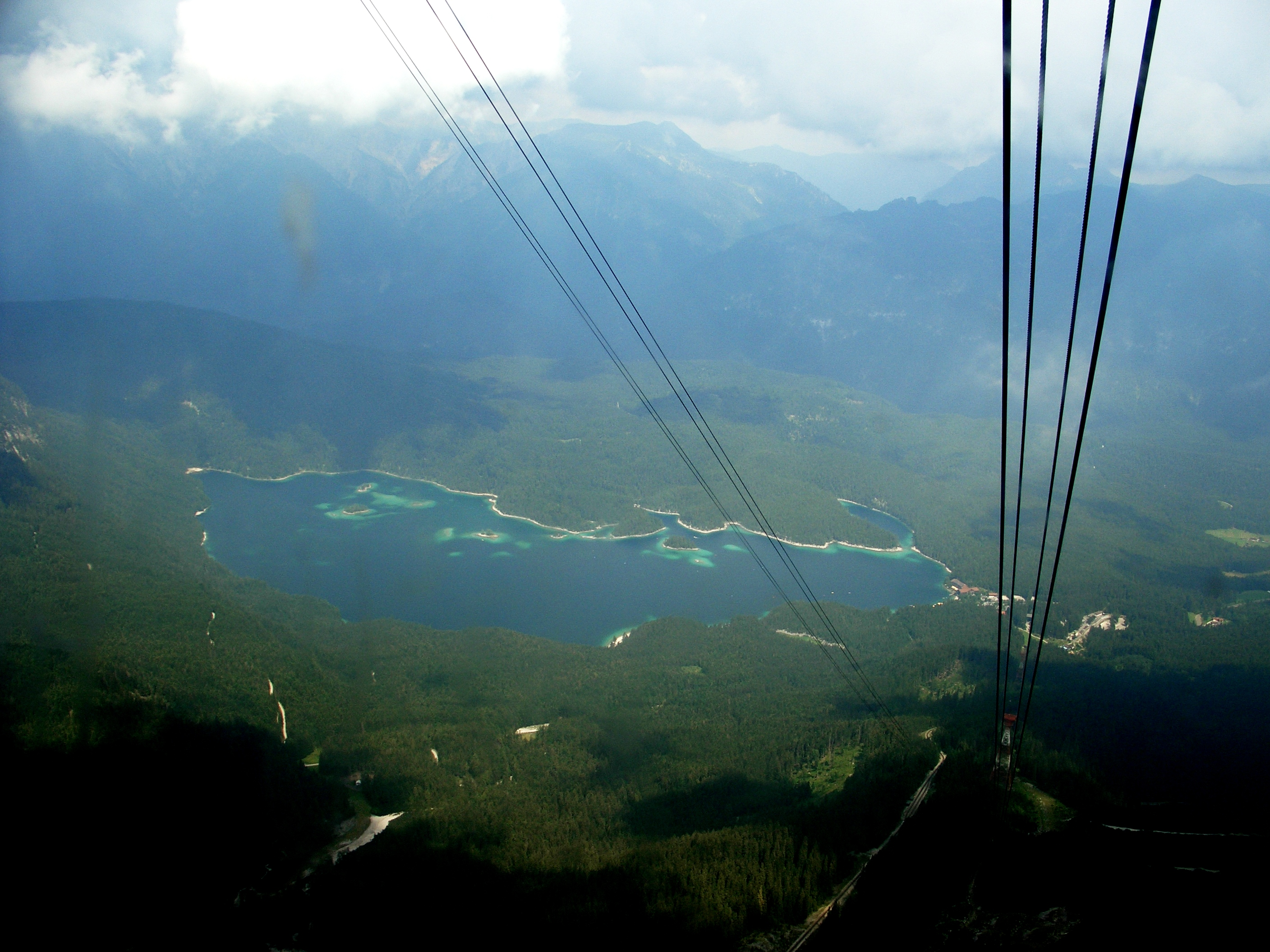 Telefèric d'Eibsee